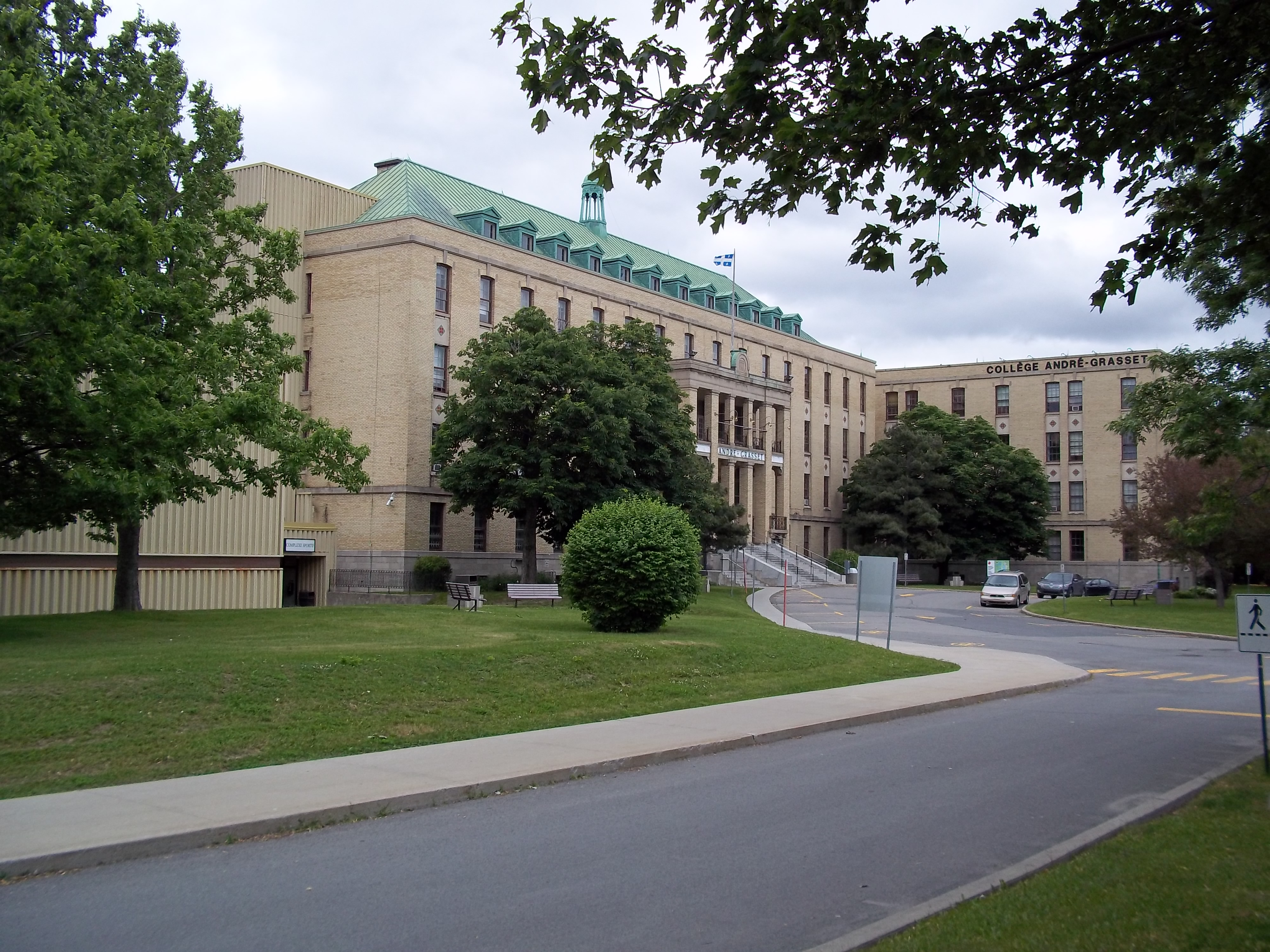 Collège André-Grasset, Montréal